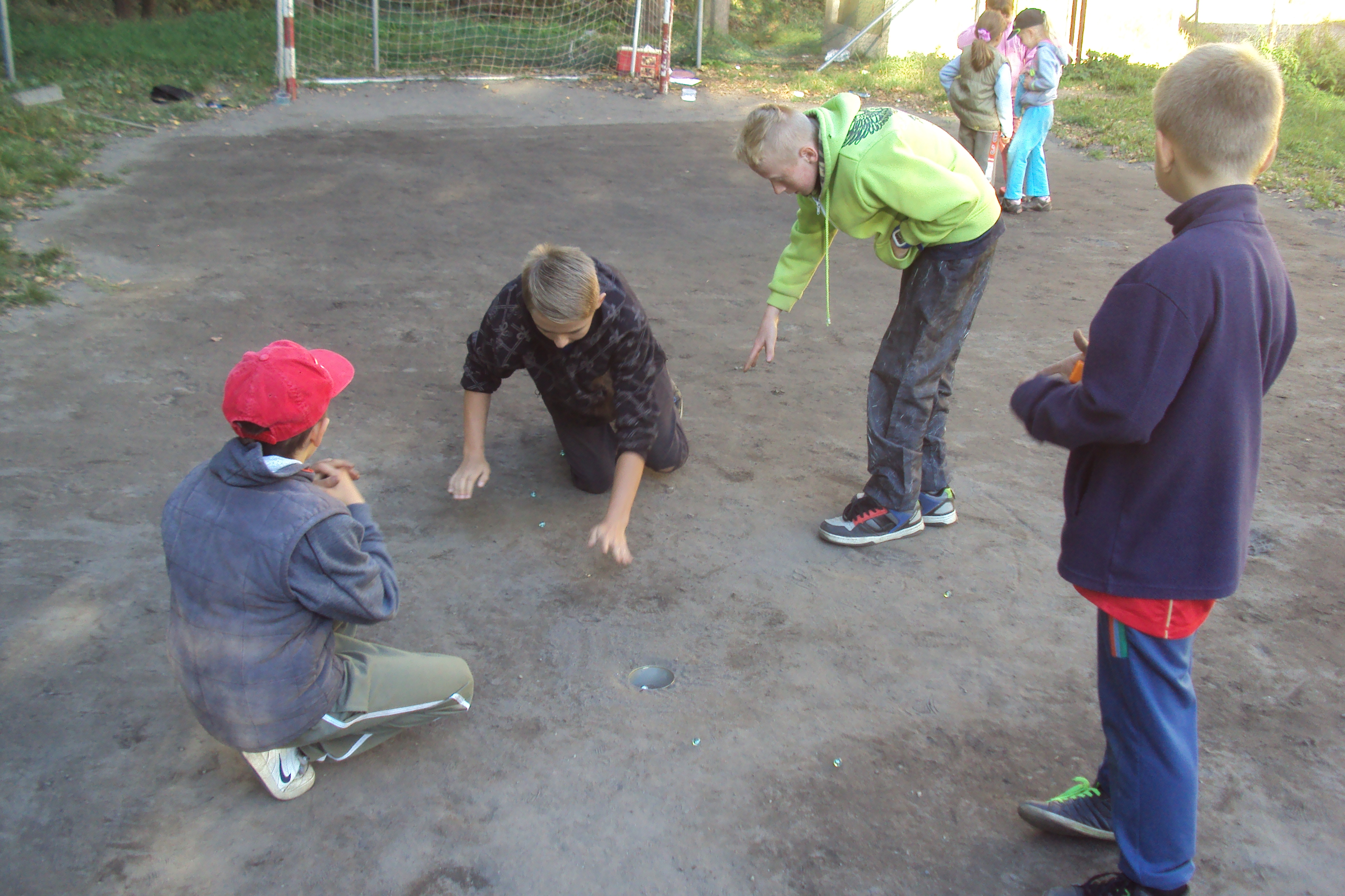 Z průběhu kuličkového turnaje